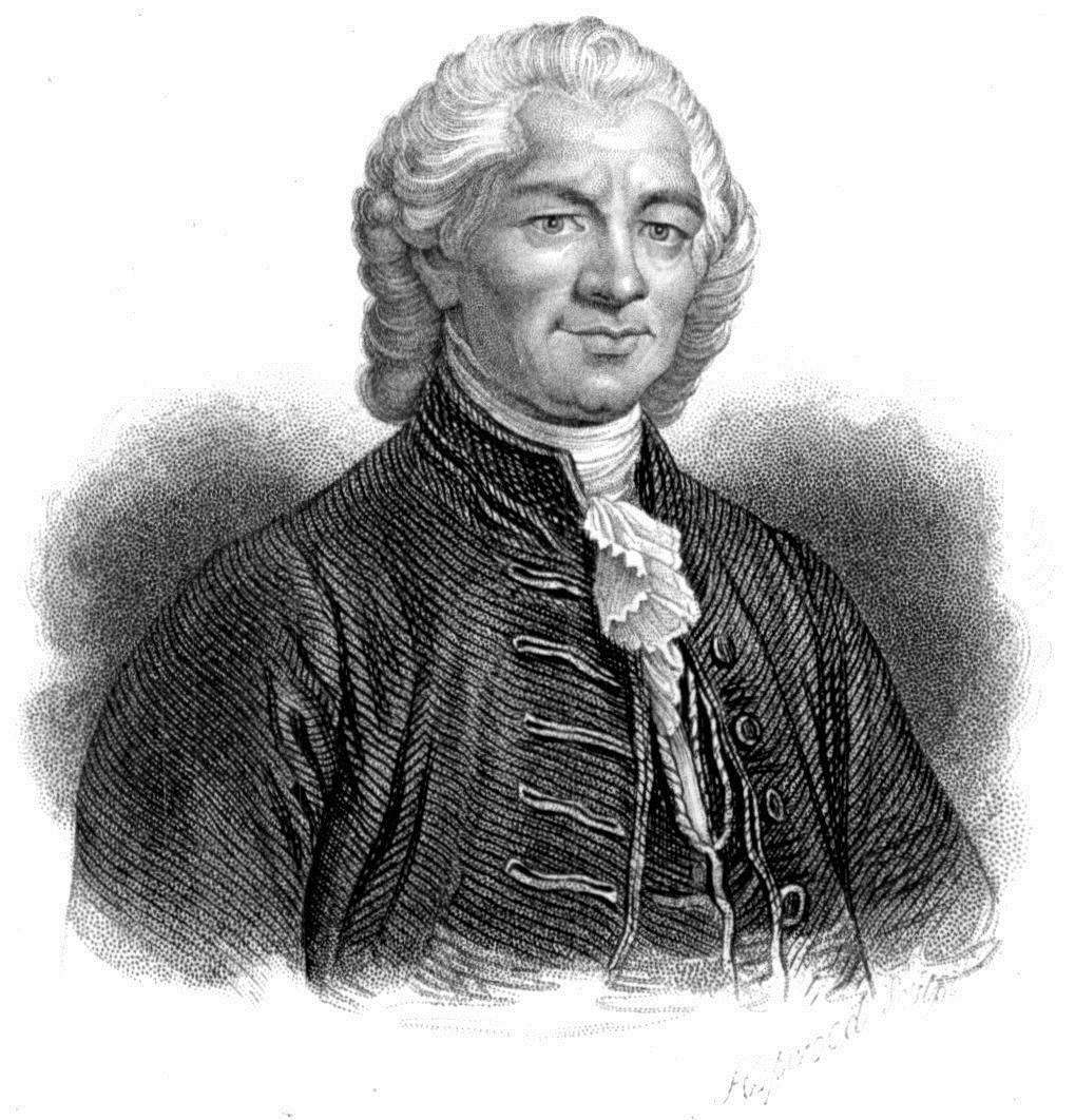 Delille. Illustration de "Histoires des météores", p. 132